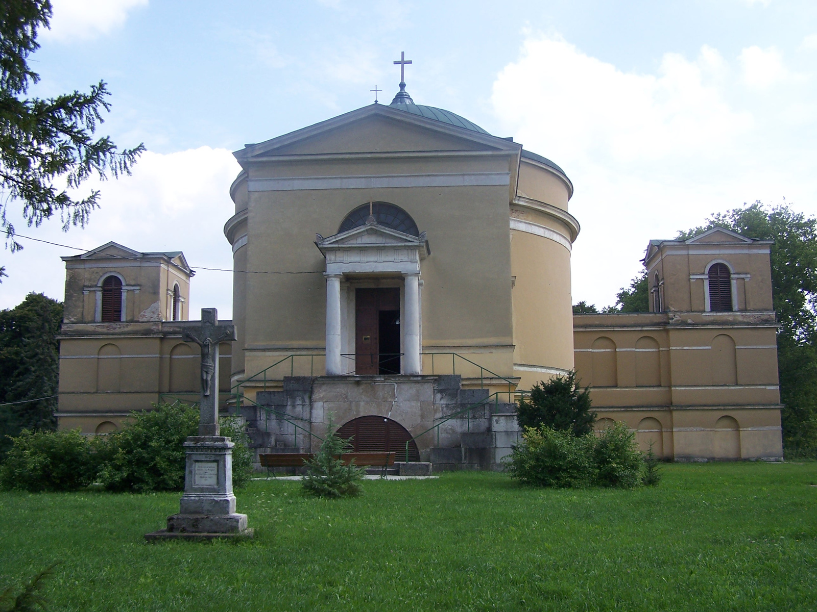 R. k. templom (Ganna, Fő utca) This is a photo of a monument in Hungary. Identifier: 9873